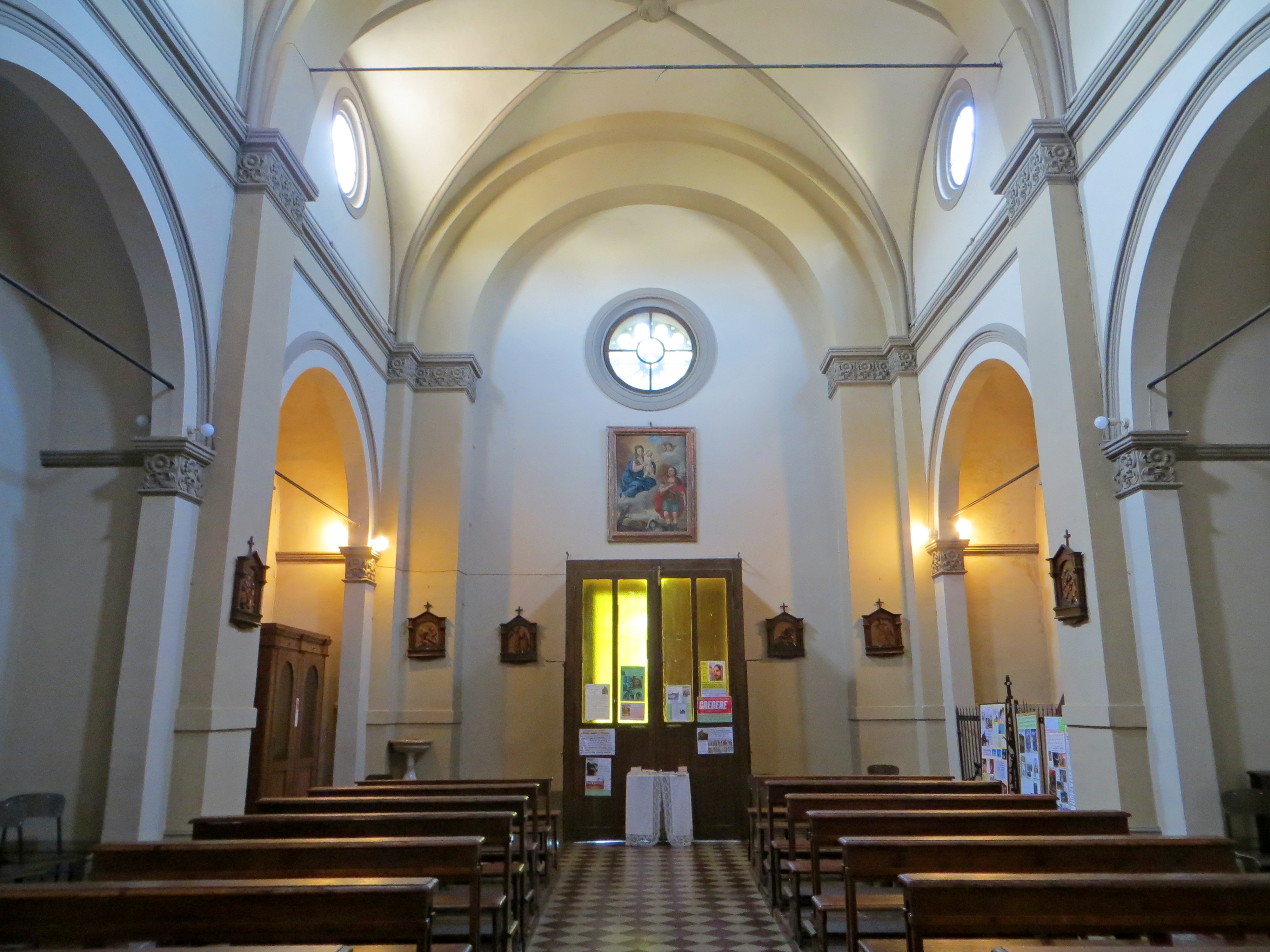 Chiesa di San Quintino (Montechiarugolo) - navata e controfacciata